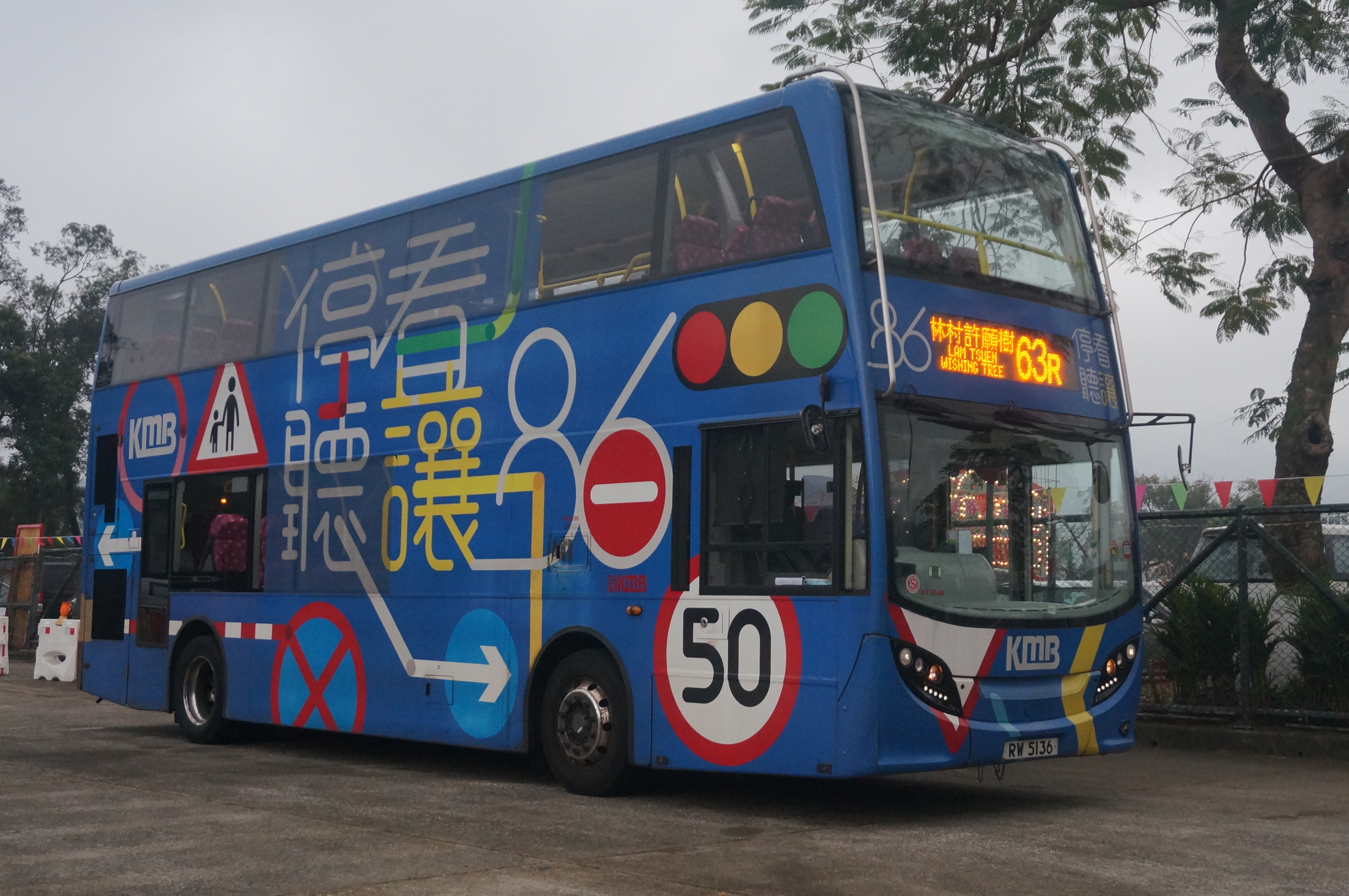 中文（香港）: RW5136@63R